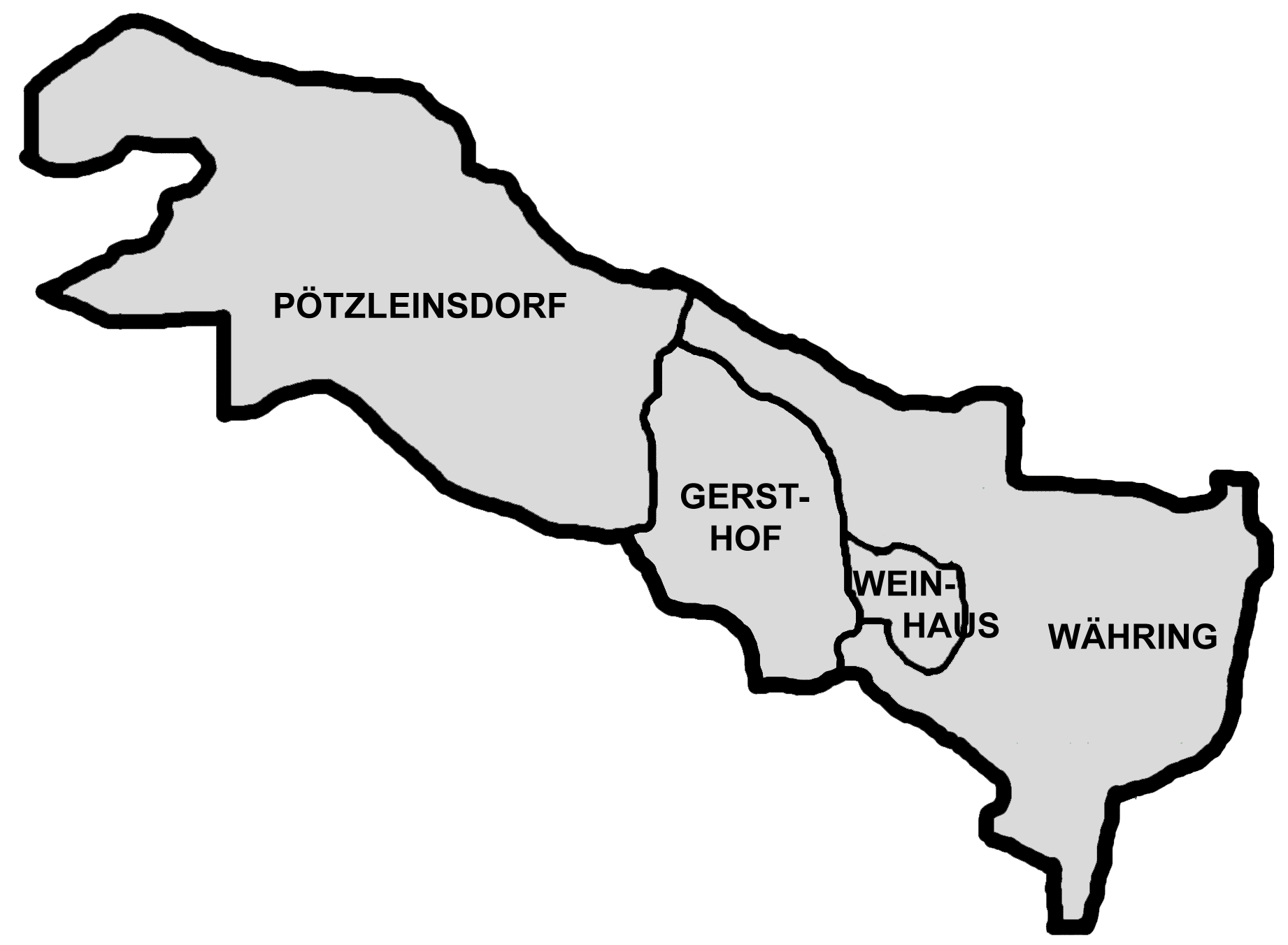 Karte der Bezirksteile von Währing in Wien